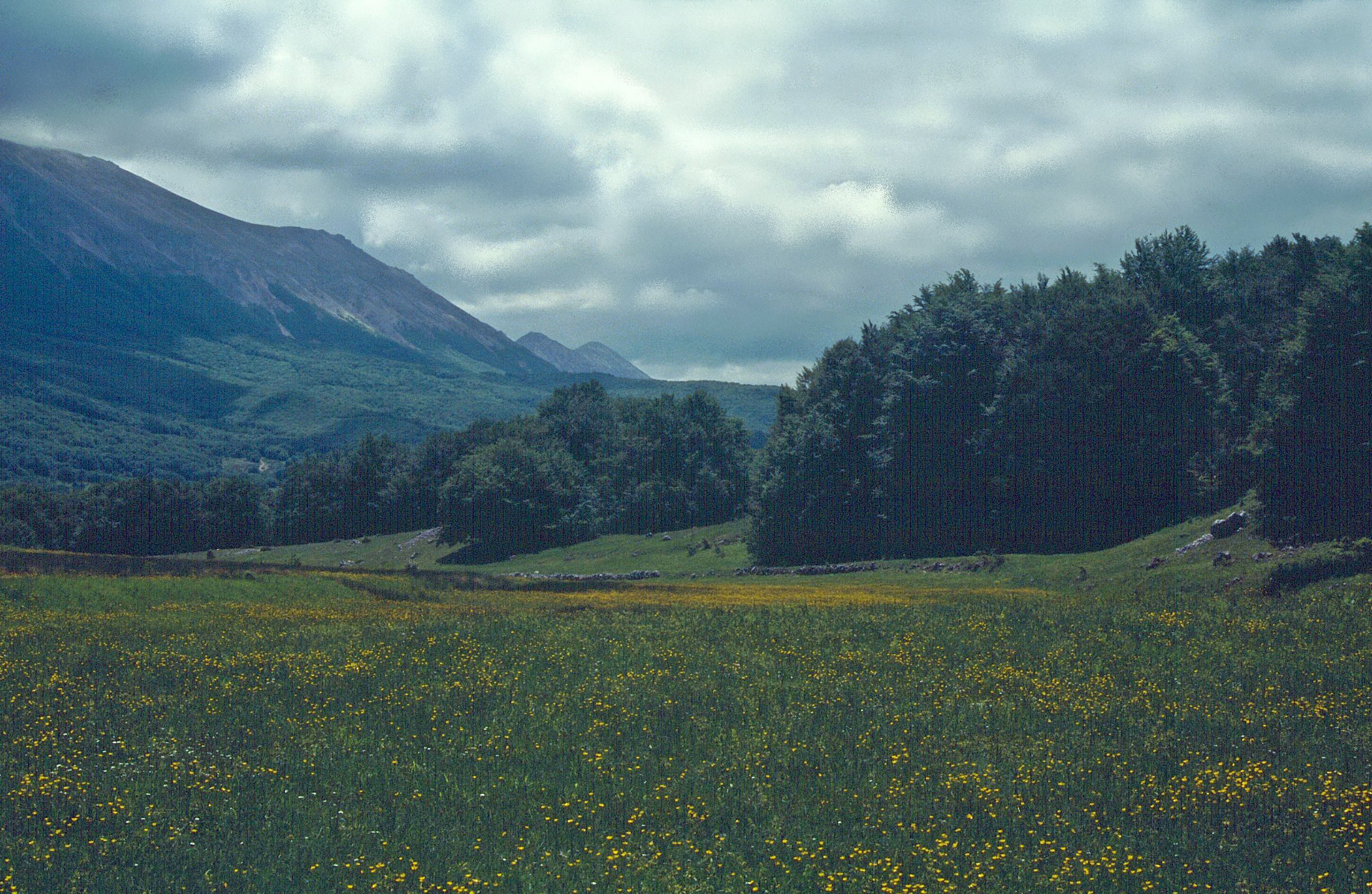 Majella-Naturpark: Passo San Leonardo